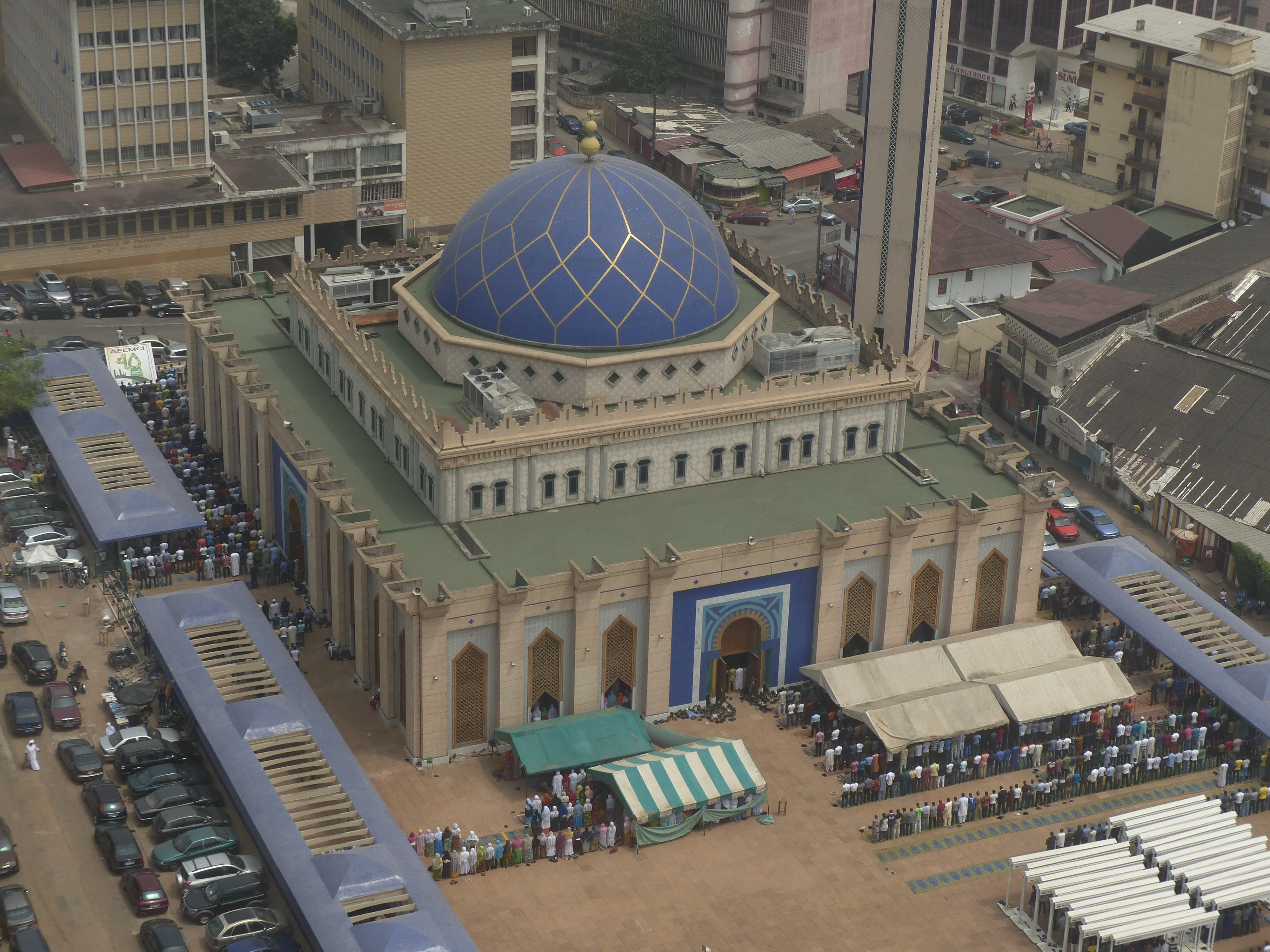 Grande Mosquée du plateau à Abidjan